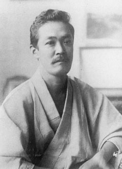 Portrait of Morita Tsunetomo